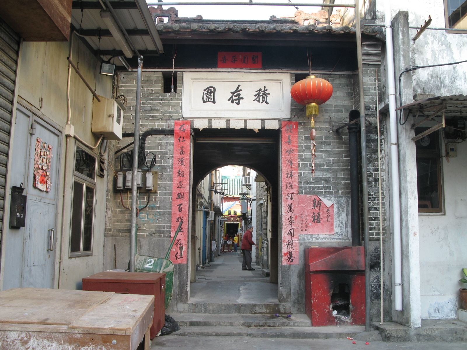 Tai Wai Village Main Entrance Front